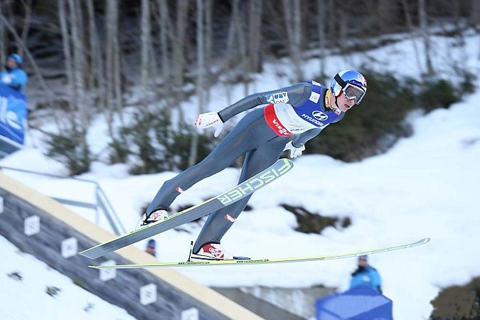 Konkurs drużynowy mężczyzn na skoczni K-120